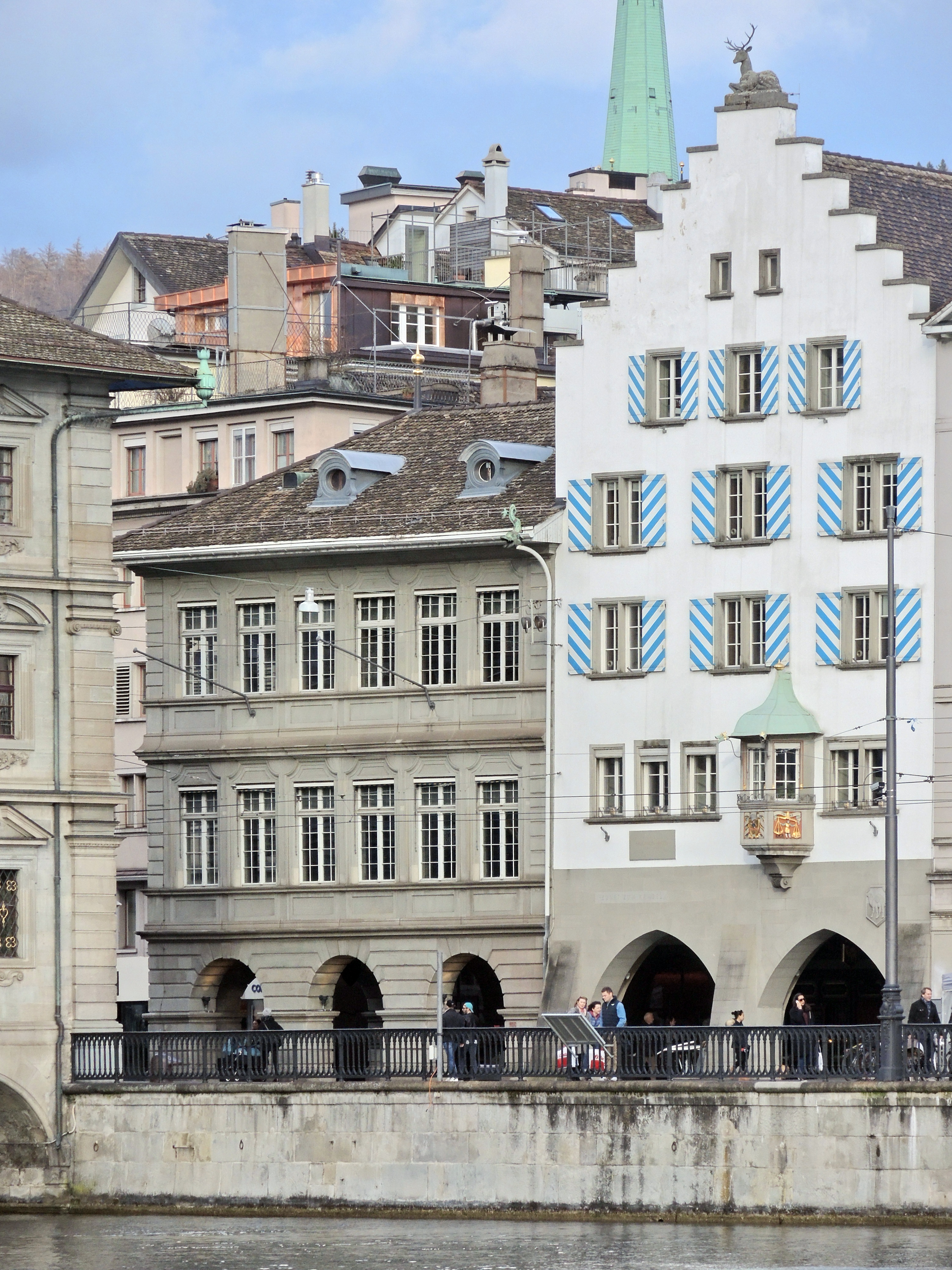 Limmatquai in Zürich : Zunfthaus zur Saffran, Rathaus respectively Rathausbrücke to the left, Zunfthaus zur Haue to the right, as seen from Wühre nearby Münsterhof.